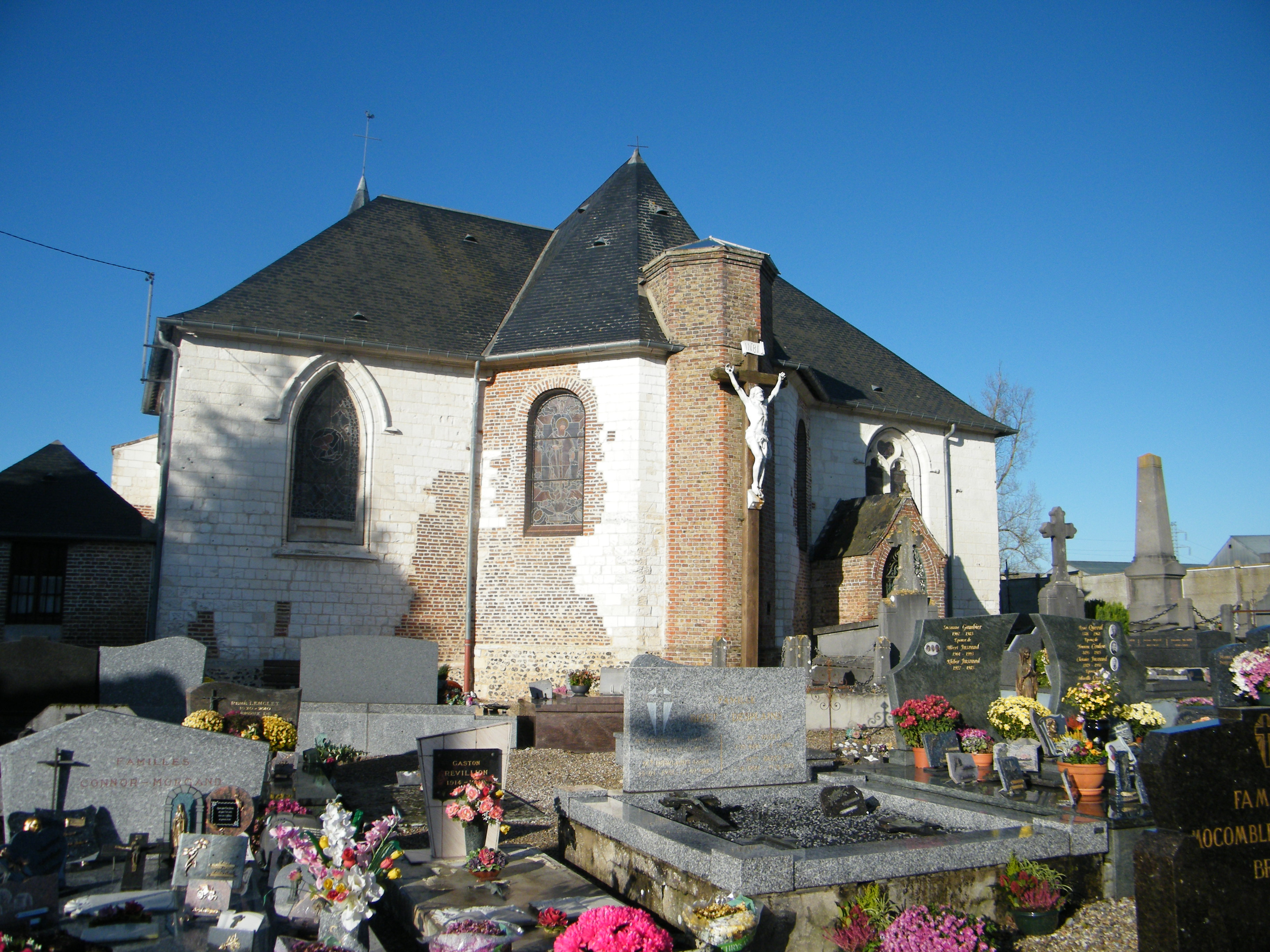 Forest-Montiers, église Saint-Martin, calvaire, nef et puits de lumière.